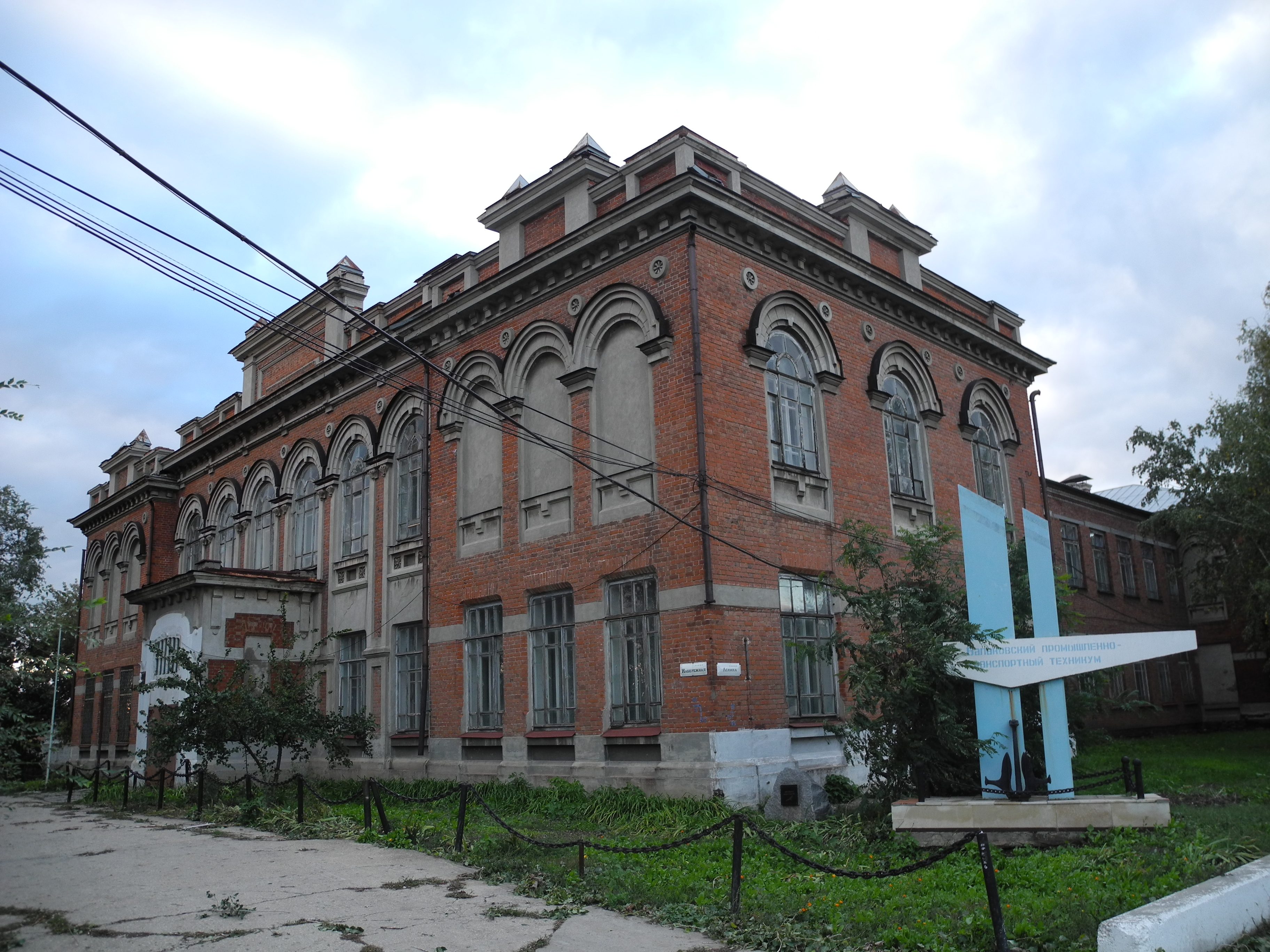 Коммерческое училище им. Кобзаря И. В. (Саратовская область, Балаково, улица Ленина, 2)